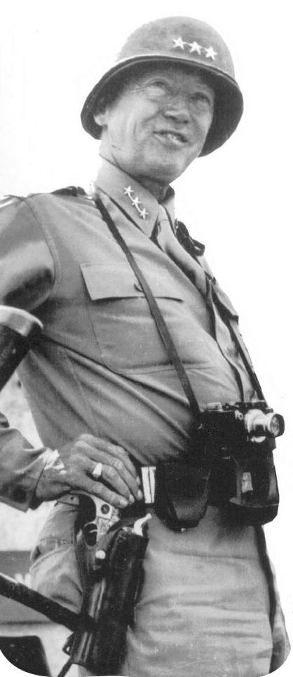 photo du lieutenant-général Patton